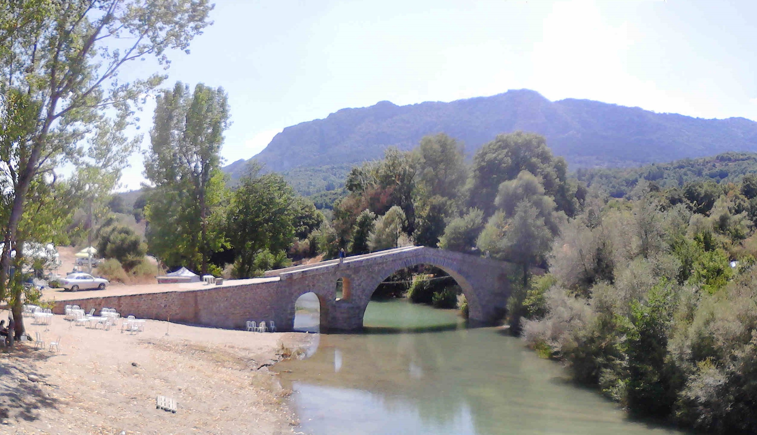 Πανόραμα από το γεφύρι του Ζιάκα